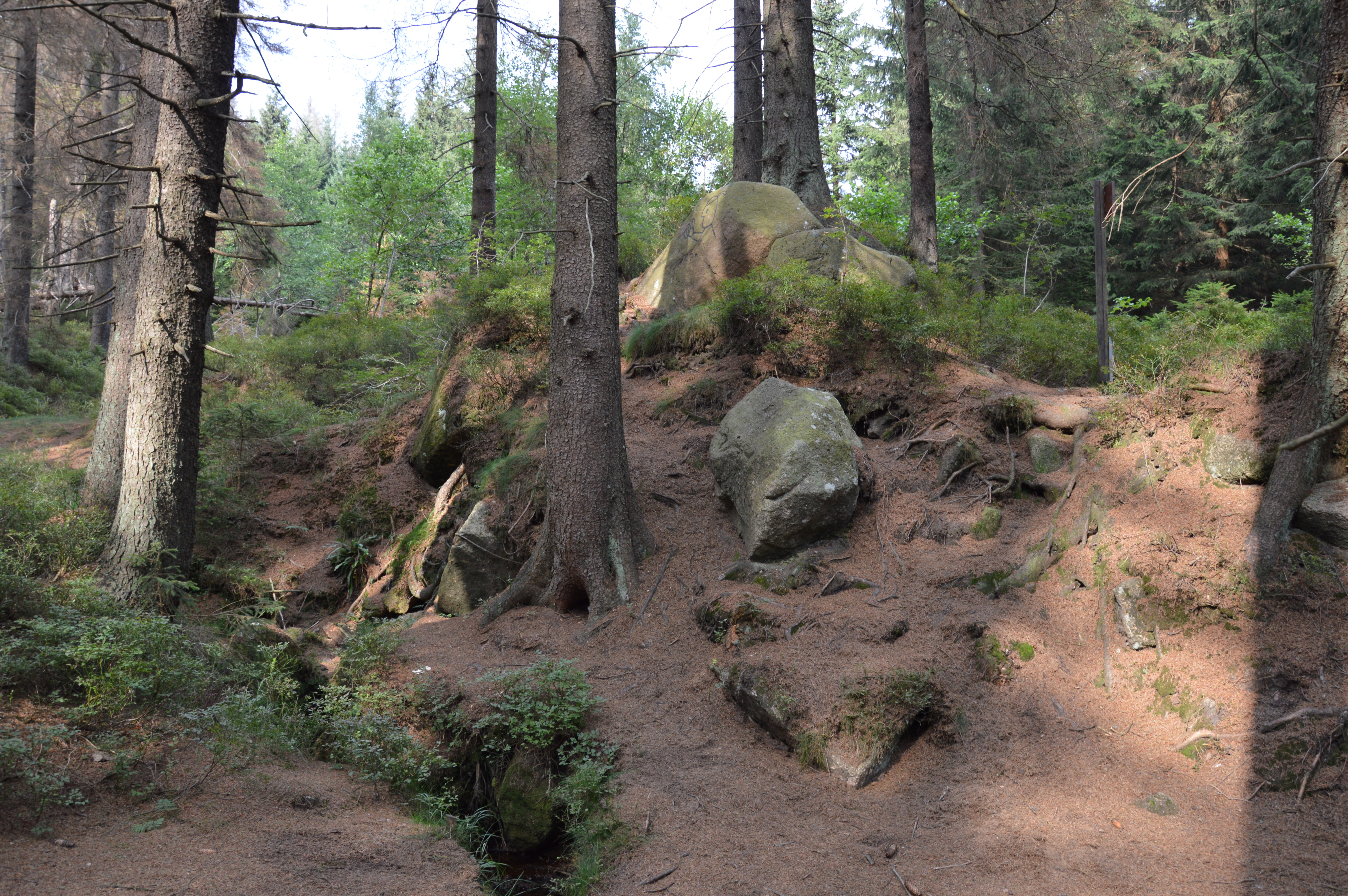 Mönchstein